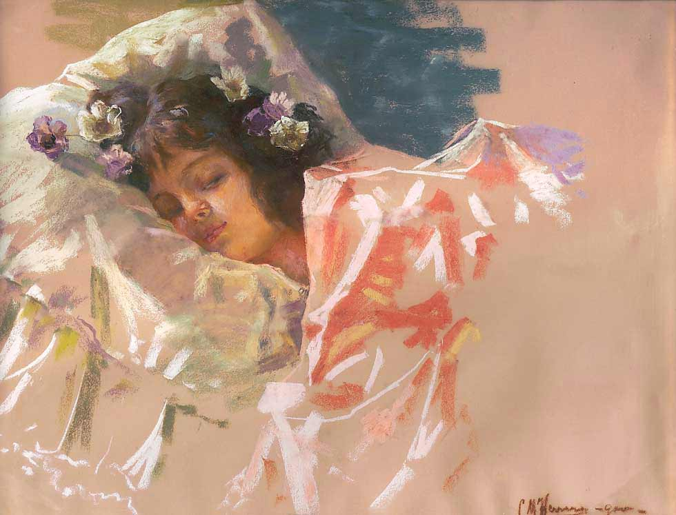 Obra del pintor uruguayo Carlos María Herrera (1875 - 1914) "Descansando", pastel sobre cartón de 50 x 67 cm.